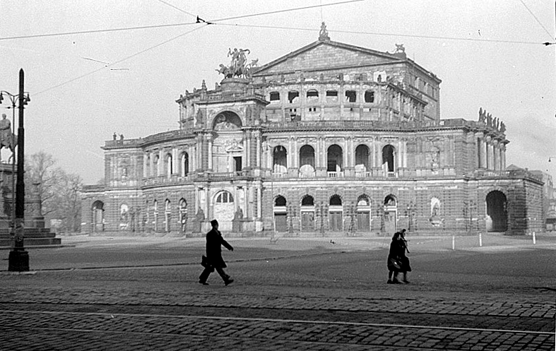 Original image description from the Deutsche FotothekAufnahmen von M. Friedrichs, M. Fischer, Hermann Matern, Arno Schellenberg und Frau, Frau Gret Palucca, Erich Ponto, Prof. Joseph Keilberth, Otto Falvay